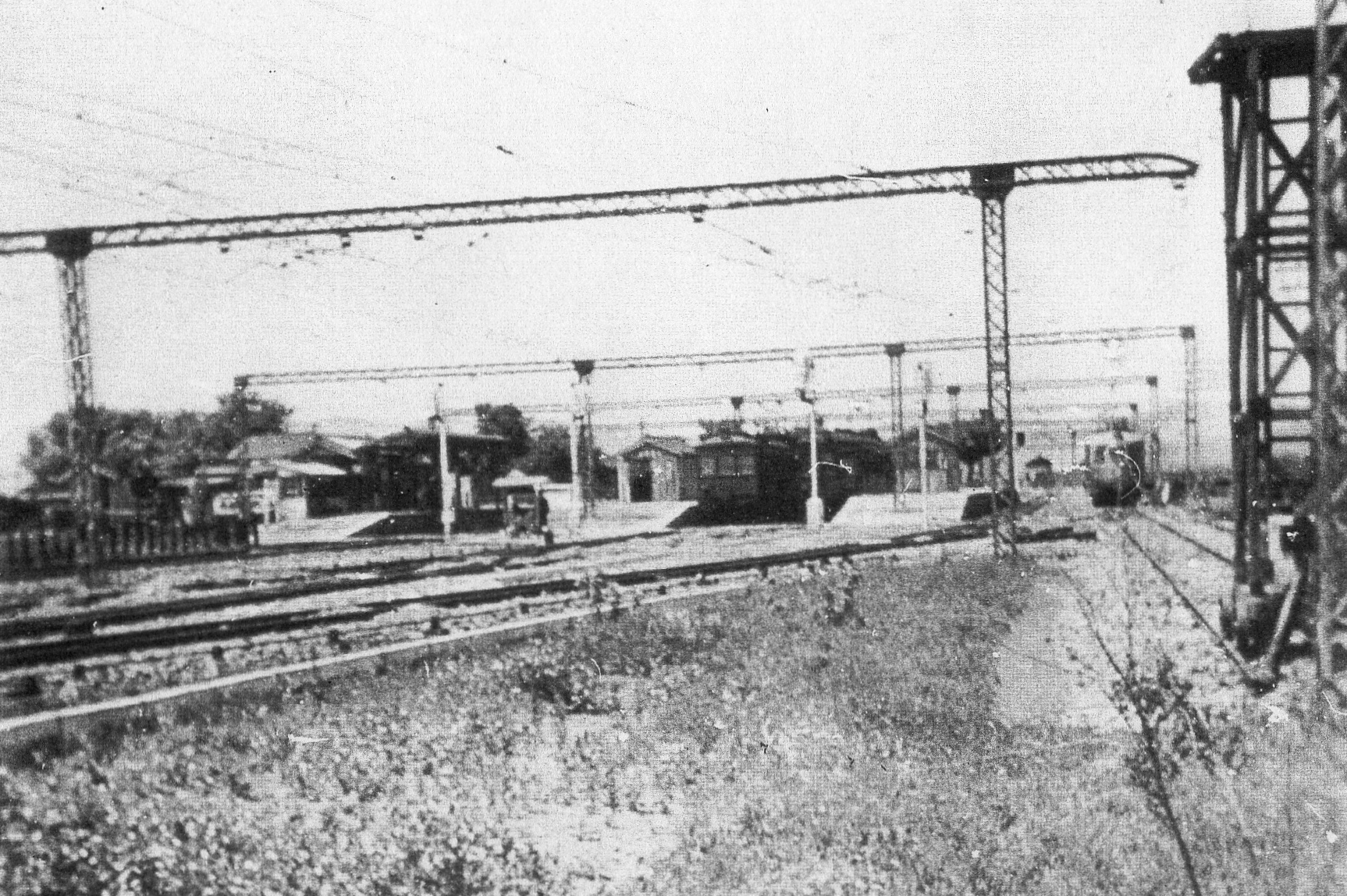 昭和15年の伊奈駅